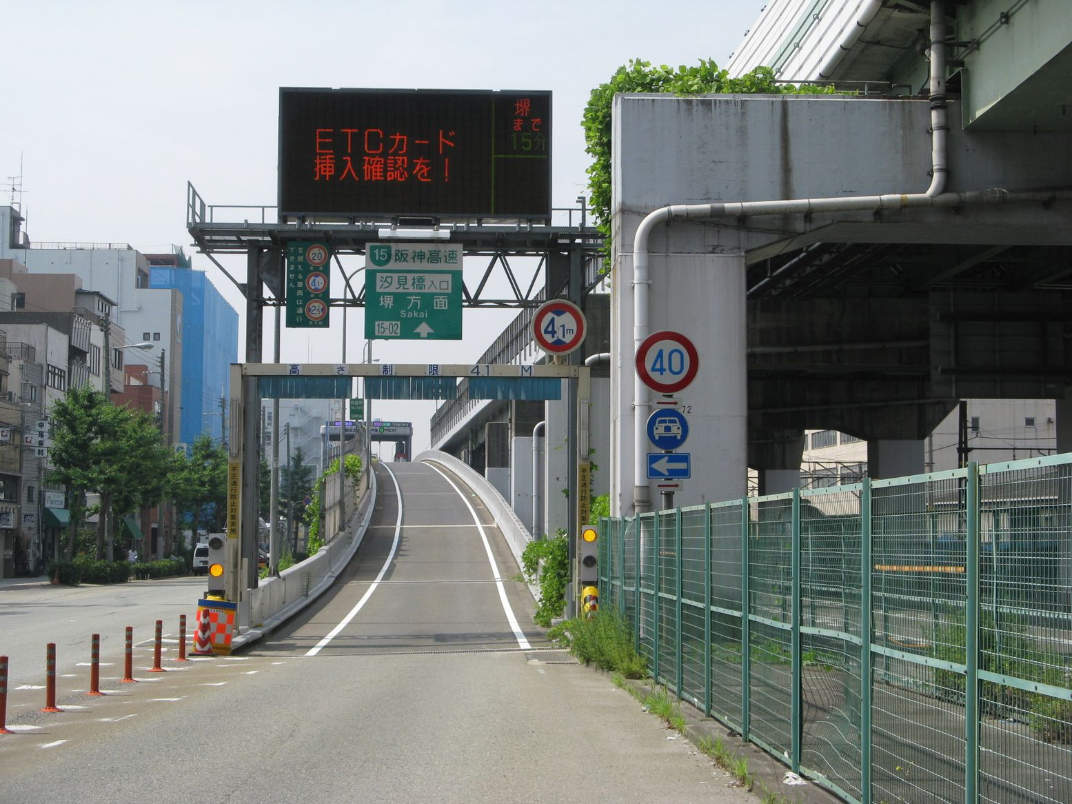 阪神高速汐見橋入口 南望